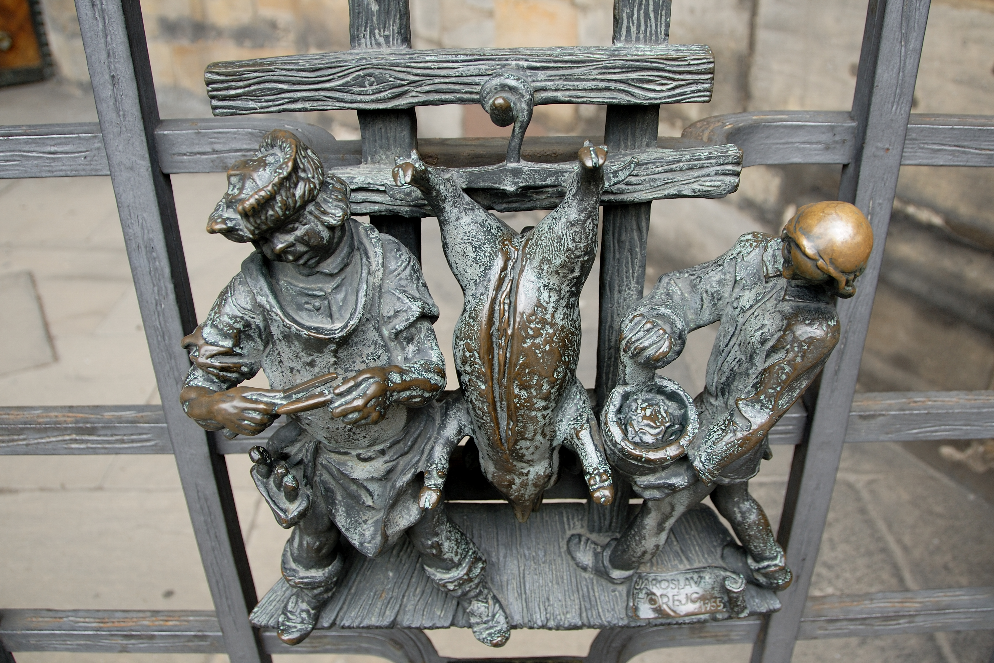 Praha, Katedrála svatého Víta, Václava a Vojtěcha, detail mříže Zlaté brány